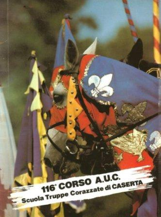 Foto della copertina della rivista militare del 116° Corso Carristi AUC - Sfondo cavalli.